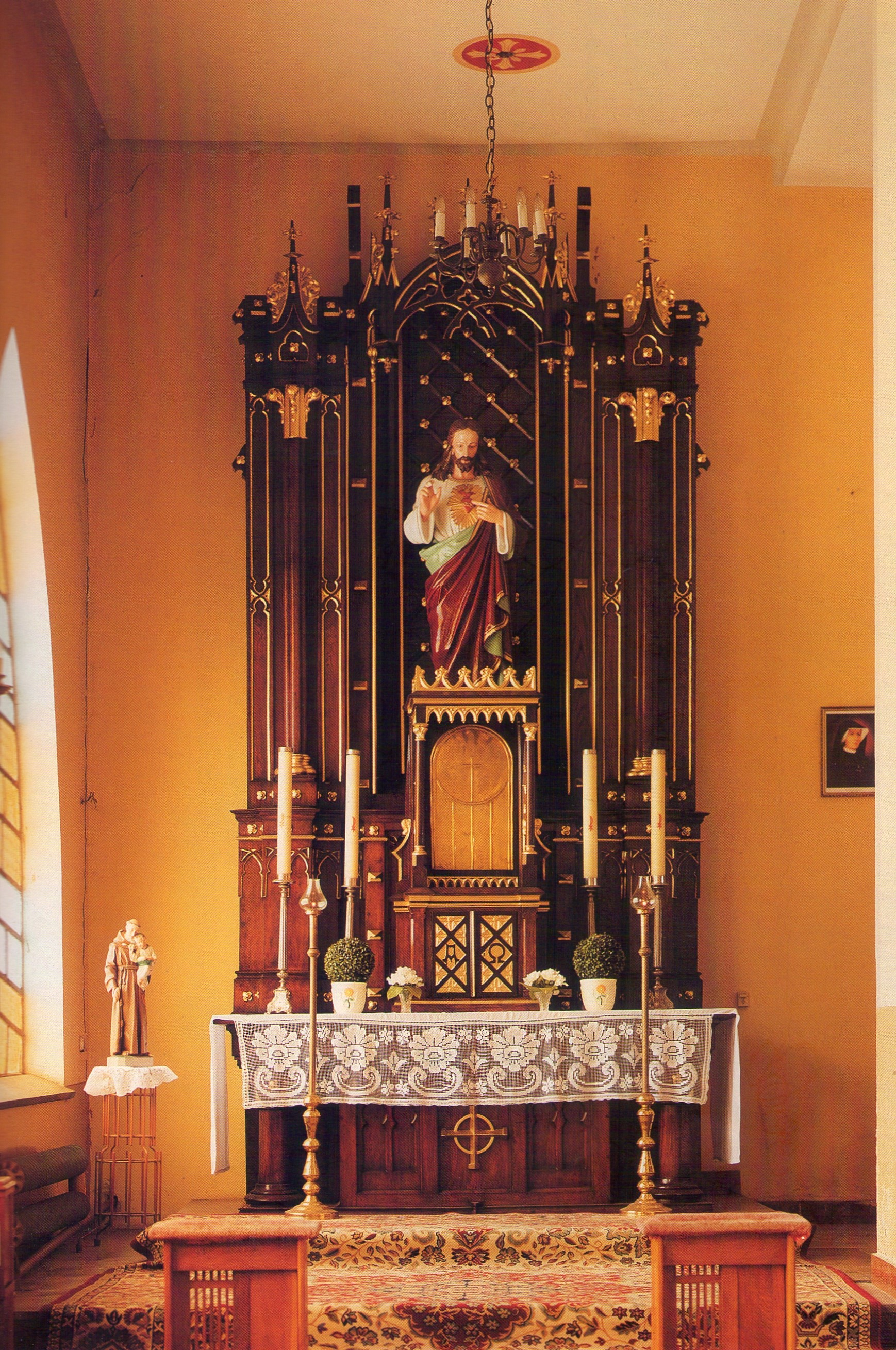 Ołtarz boczny lewy